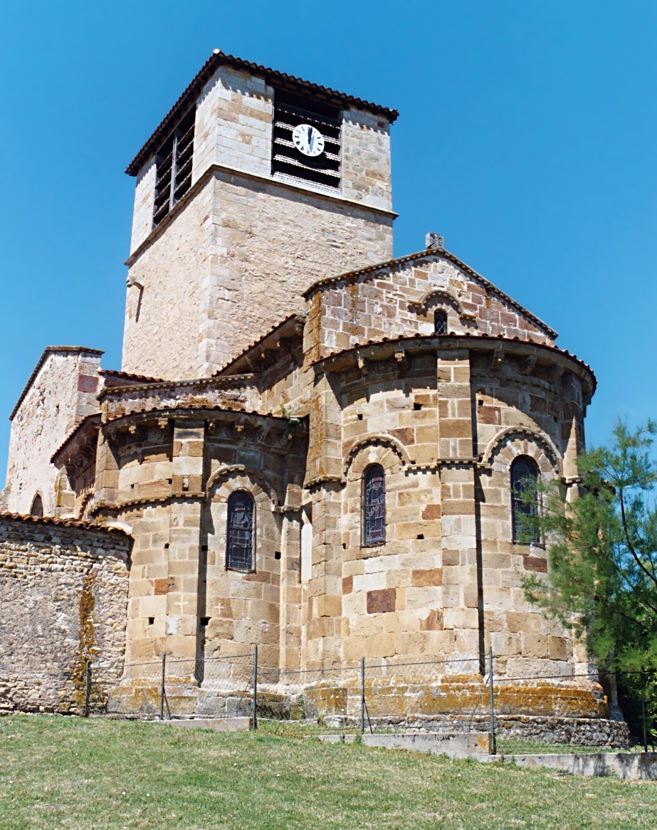 France - Auvergne - Église Saint-Jean de Glaine-Montaigut